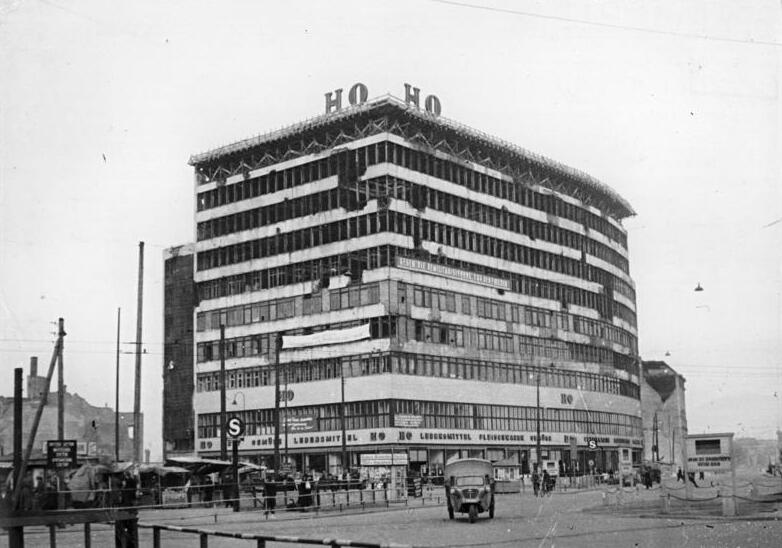 Berlin, Potsdamer Platz, "Columbushaus", Ruine, HO-Warenhaus Zentralbild B. 27.12.50 HO-Kaufhaus am Potsdamer Platz. Information added by Wikimedia users.